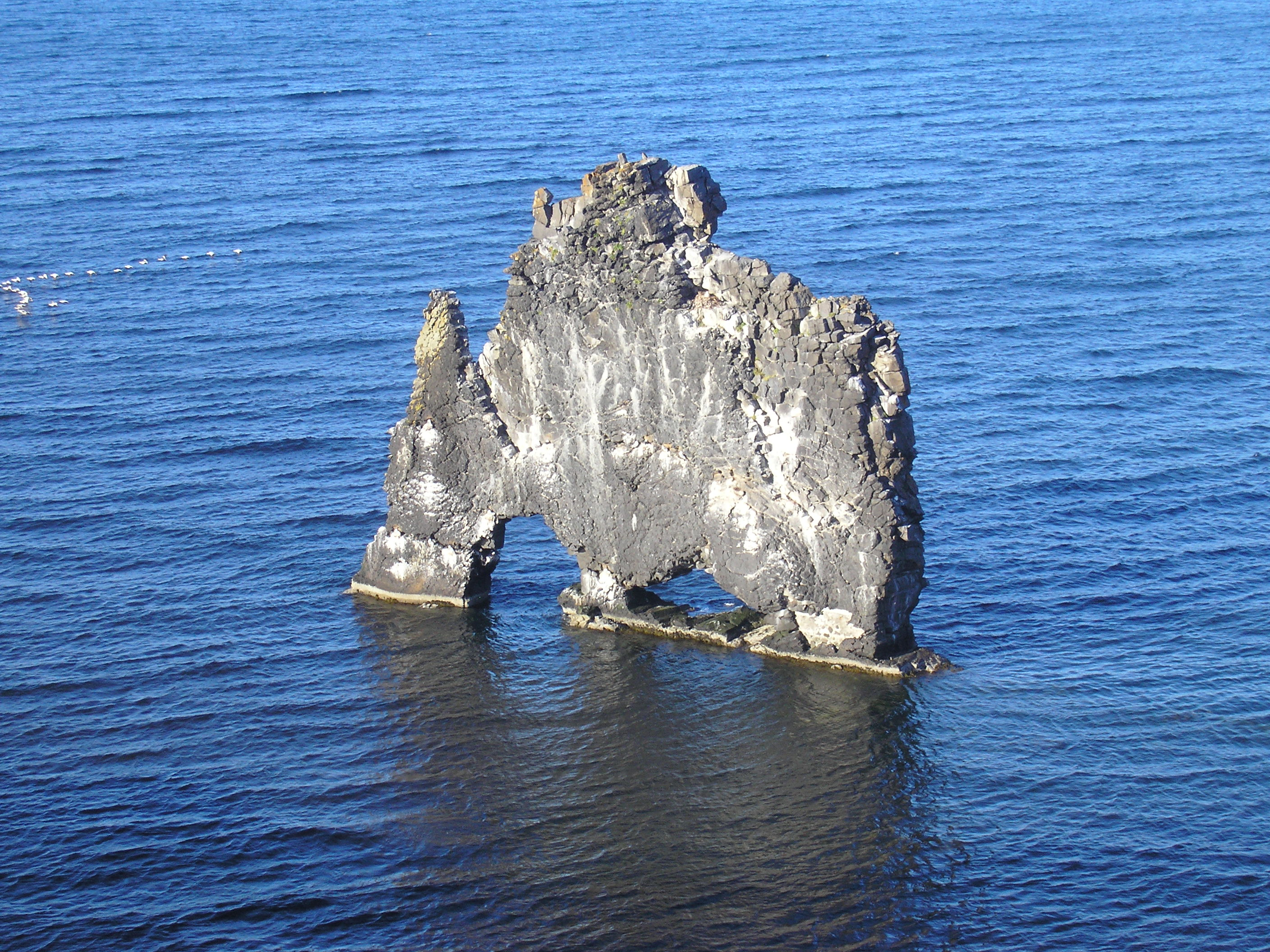 Hvítserkur í Húnafirði